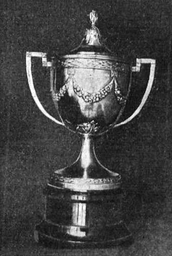 Imagen del trofeo disputado en la Copa del Rey de fútbol de 1911-1912